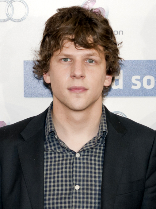 El actor Jesse Eisenberg en el estreno de La red social (The social network) en Madrid, España, el 6 de octubre de 2010.